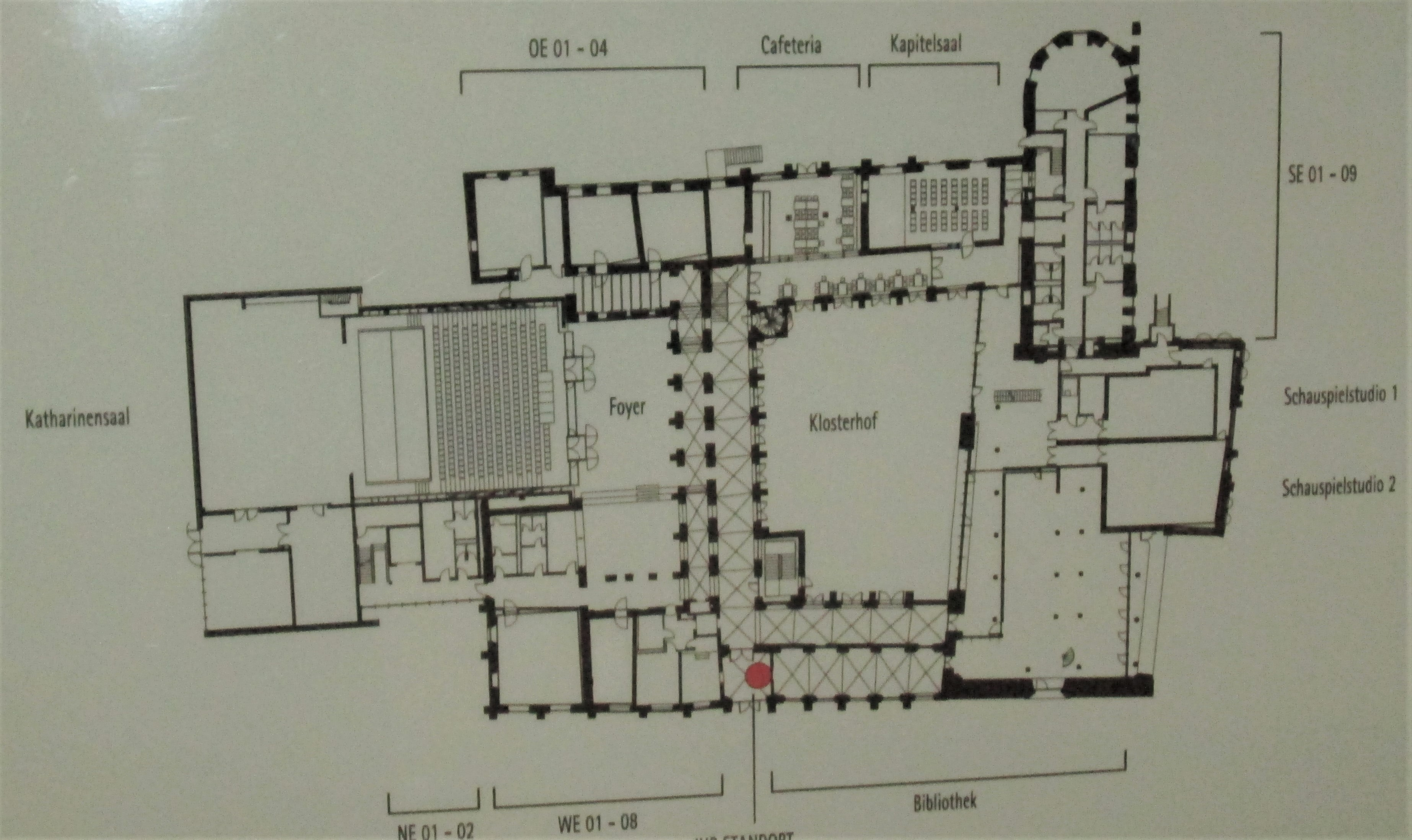 Katharinenkloster Rostock (Franziskaner), Rekonstruktrion des Grundrisses (Hochschule für Musik und Theater Rostock)